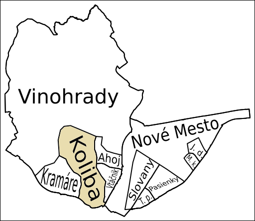 Koliba, Nové Mesto, Bratislava